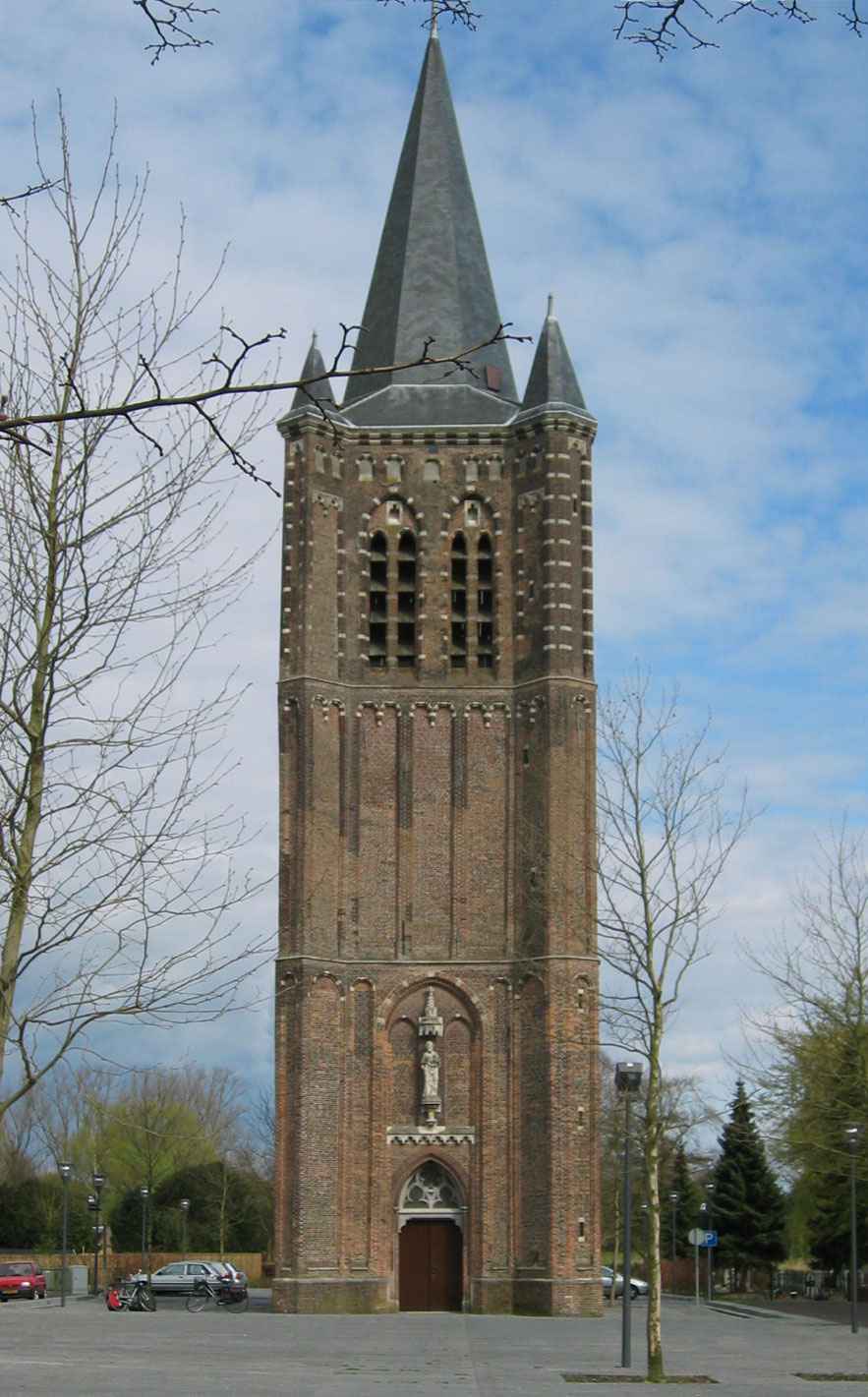 Son, Nederland (NL), Kerktoren